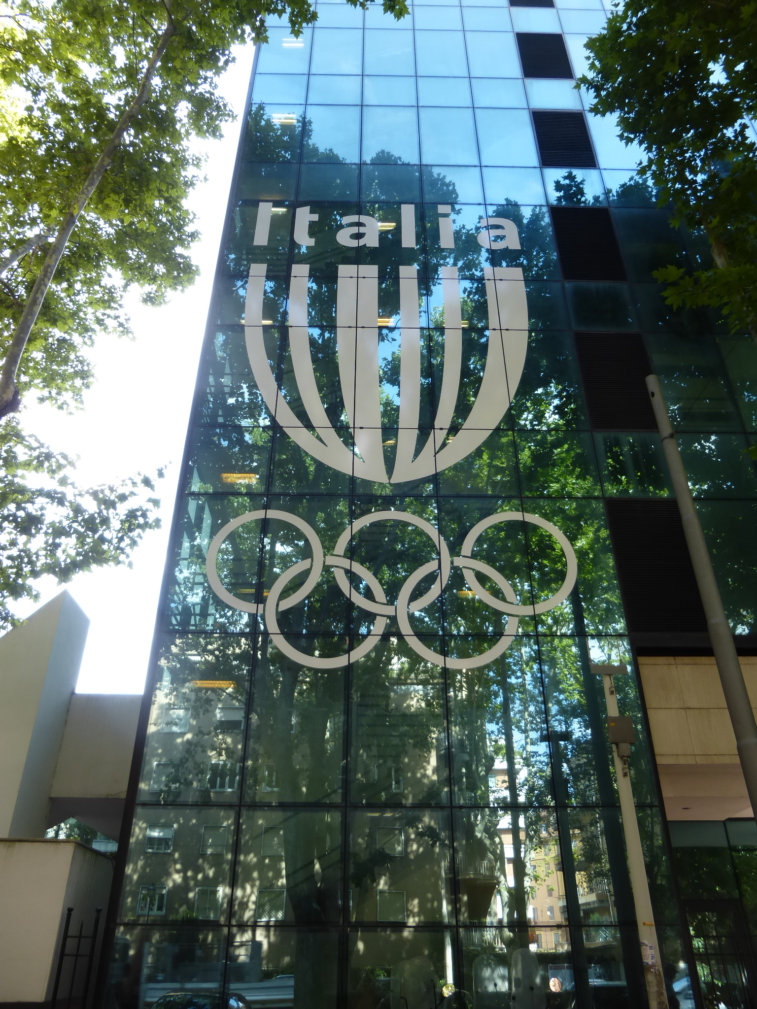 Roma, viale Tiziano, palazzo del Coni